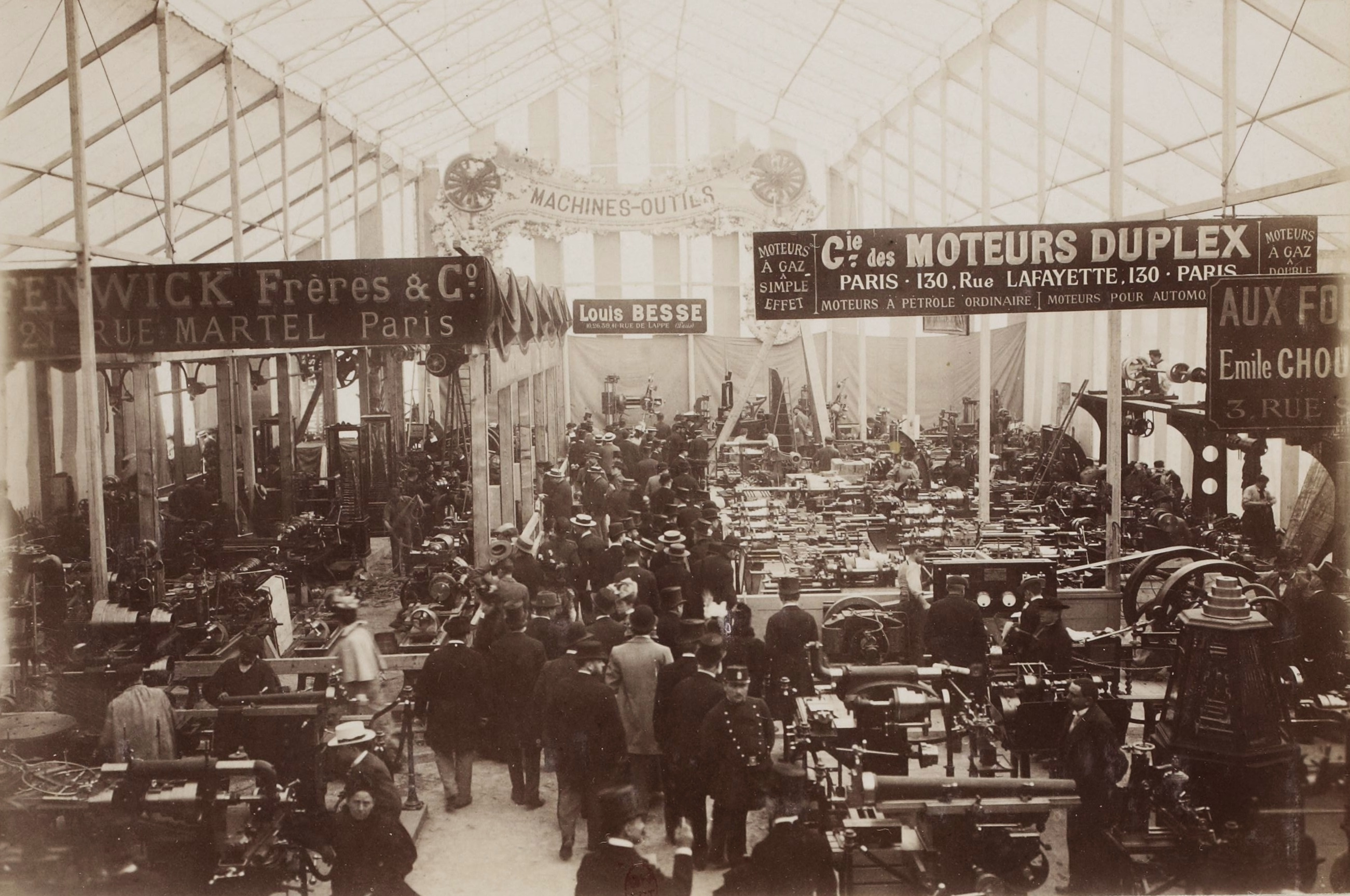 [Collection Jules Beau. Photographie sportive] : T. 7. Année 1898 / Jules Beau : F. 14. [Exposition de l'Automobile Club de France, Tuileries, 15 juin 1898]